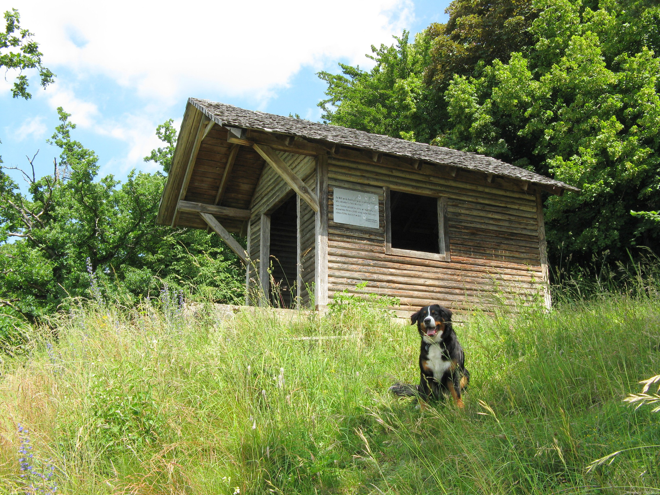 Die Schutzhuette oberhalb der Bocksteinhoehle im Lonetal, Süddeutschland